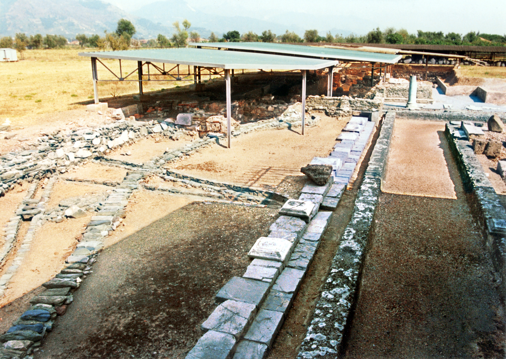 Luna, Forum, Provinz La Spezia, Italien: Nördlicher Forumsbereich.